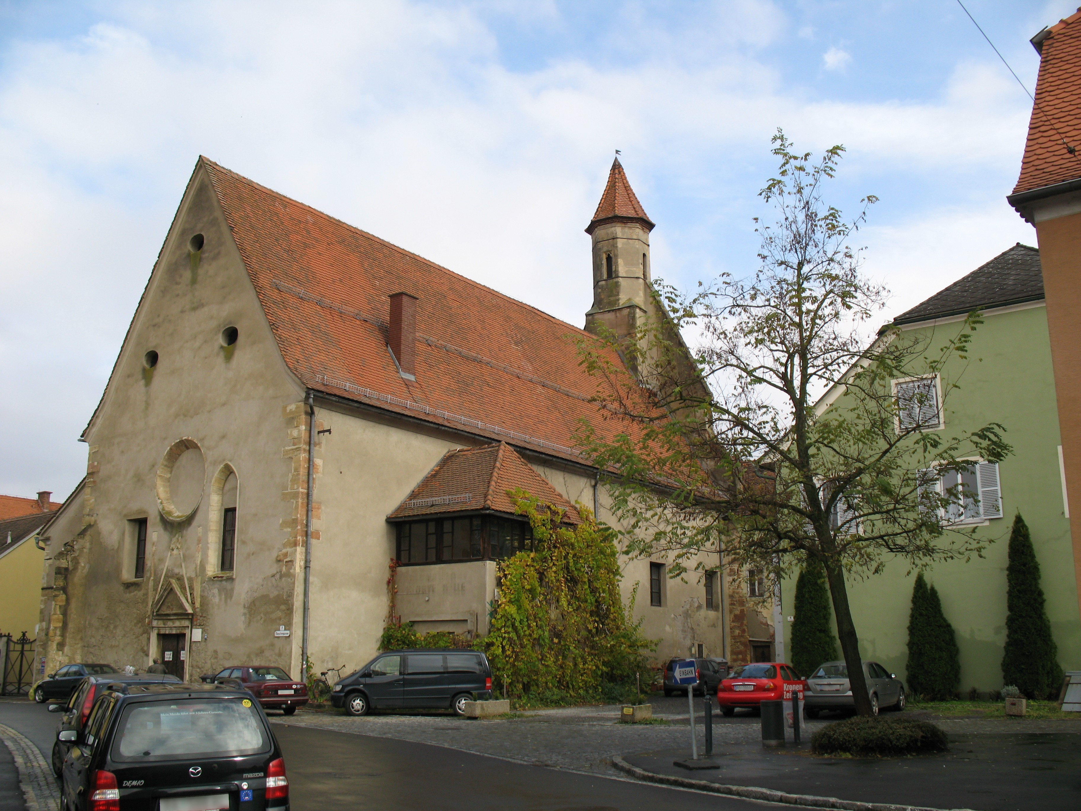 Ehem. Augustiner-Eremitenkirche